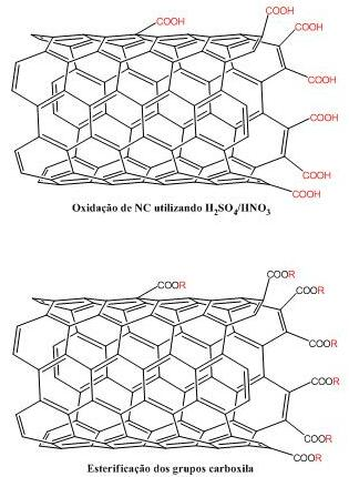 fig 7